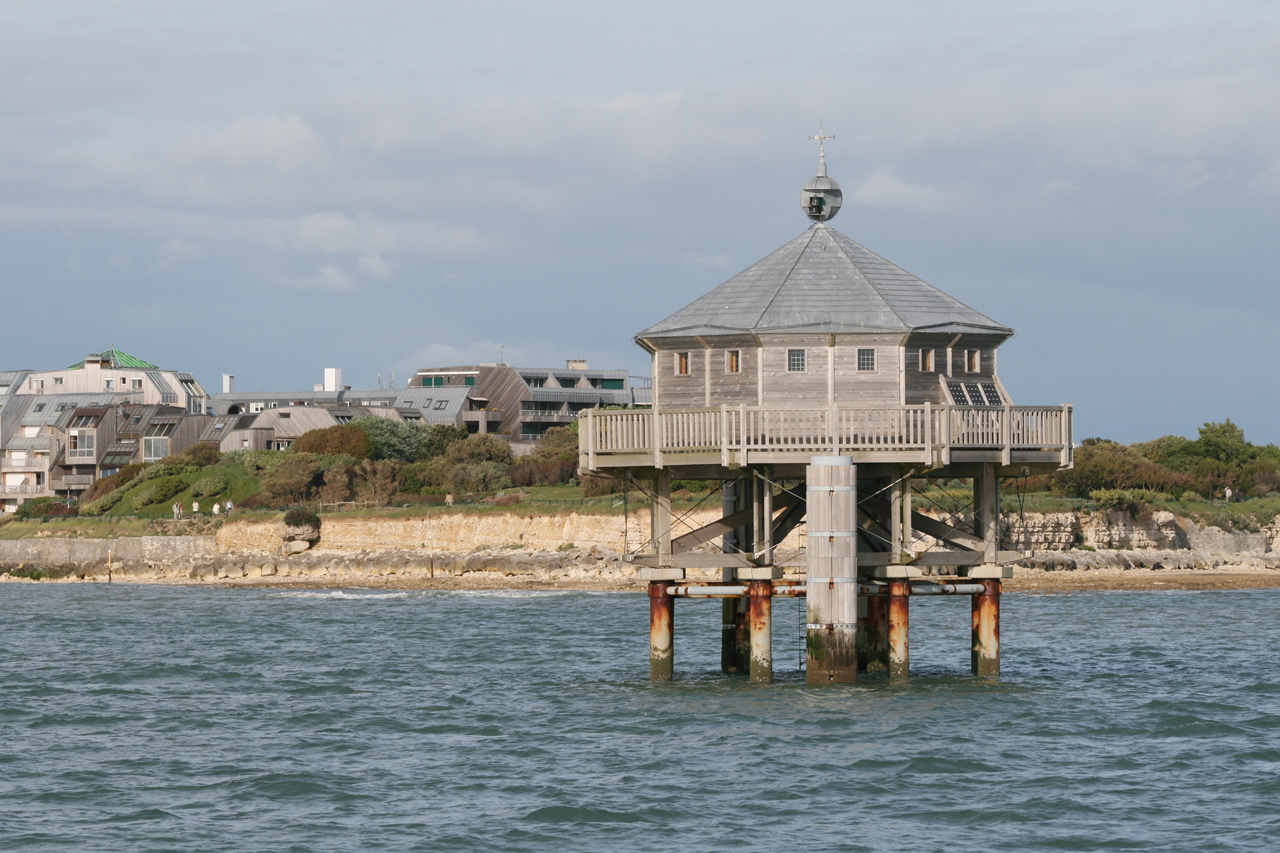 Phare du bout du monde à La Rochelle